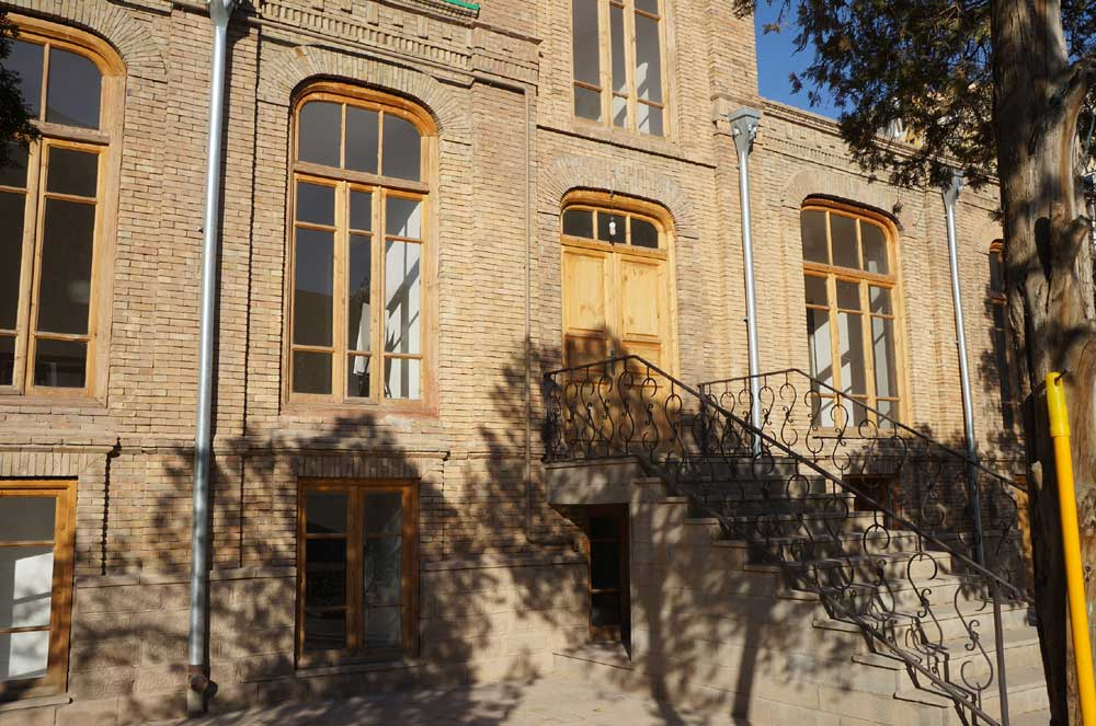 Tabriz, Iran